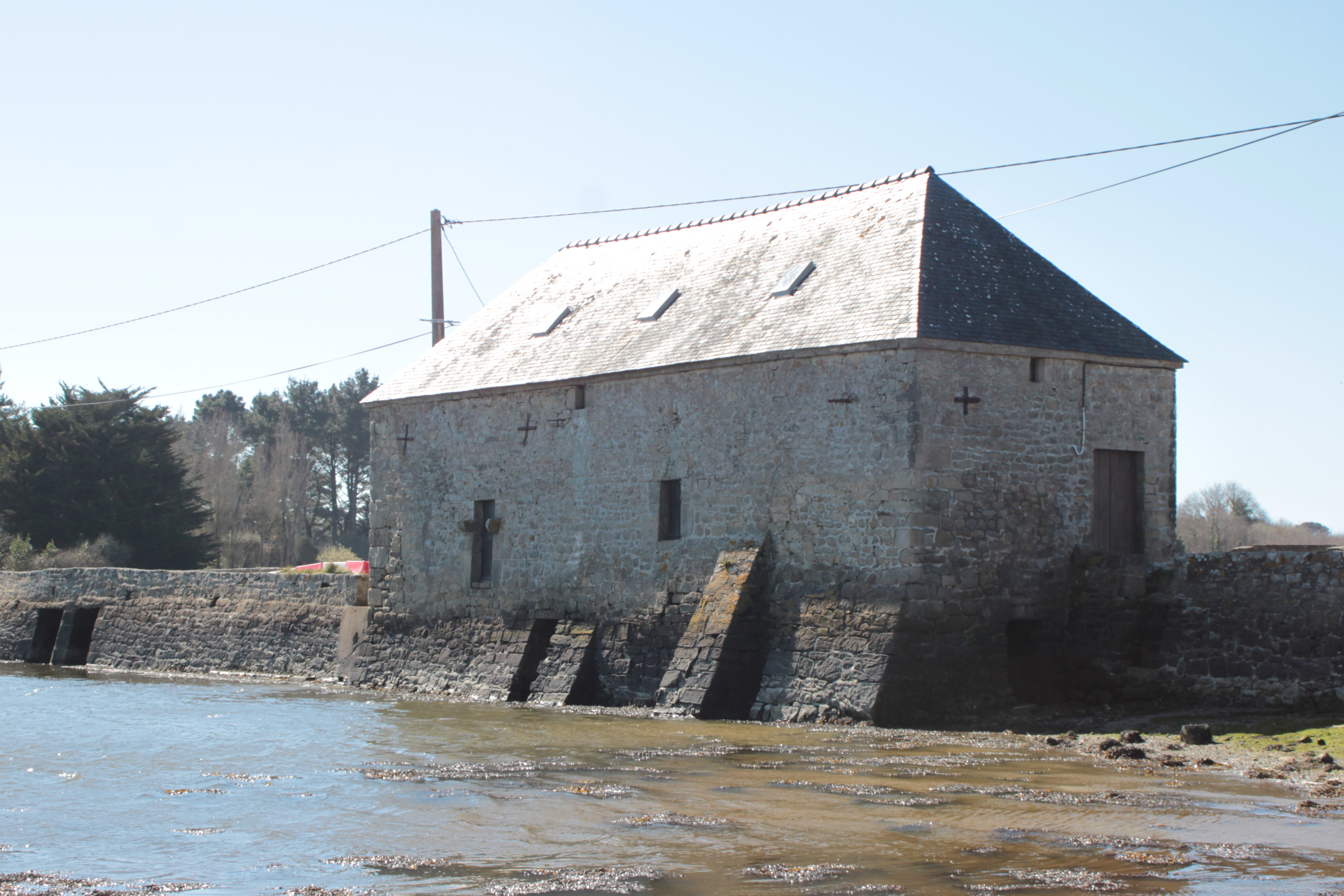 Moulin à marée de Kerouarch, Fr-56-Locmariaquer.